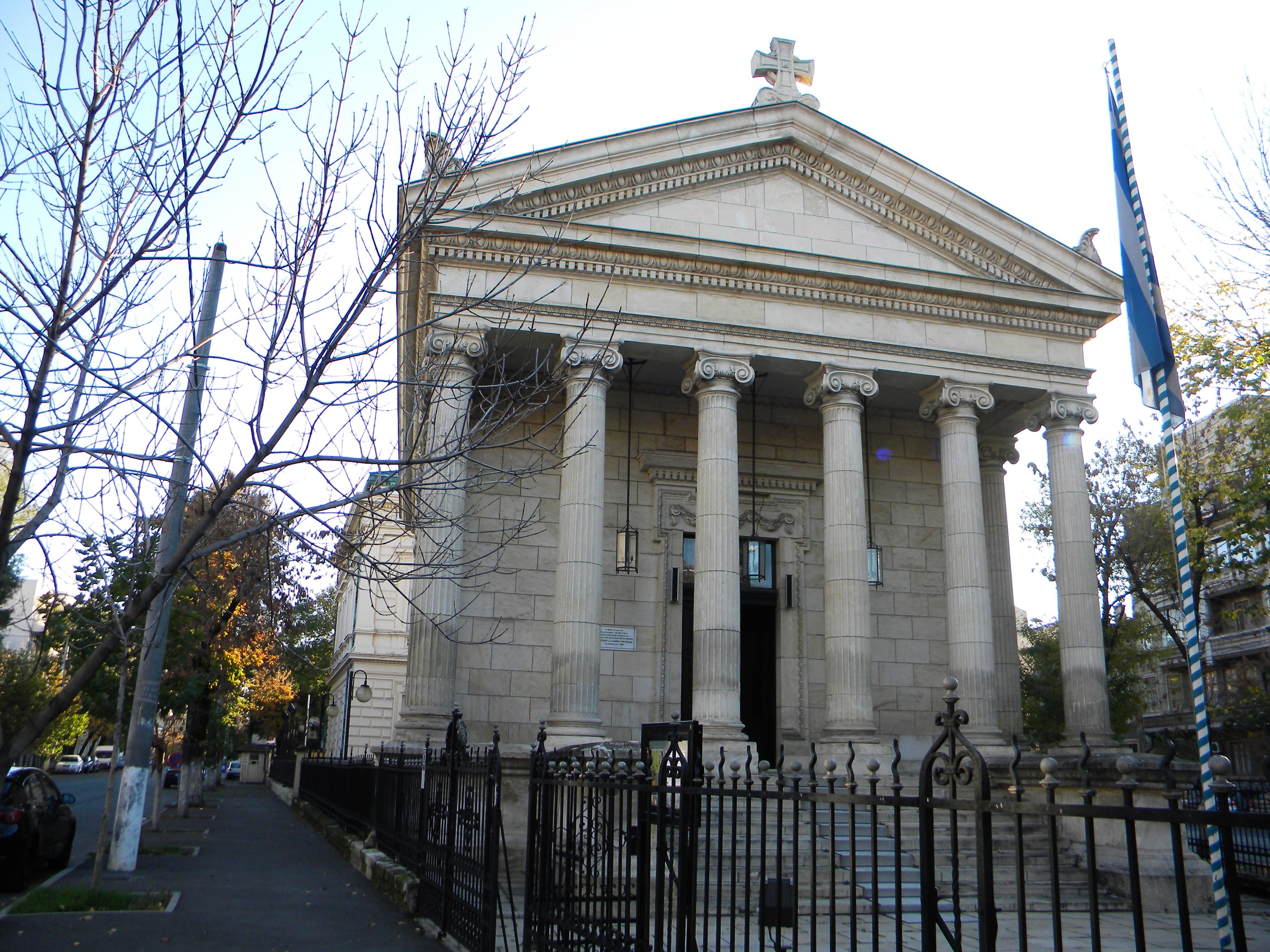 Bucuresti, Romania, Biserica Greaca (Buna Vestire), Pache Protopopescu nr. 1-3; B-II-m-A-19472